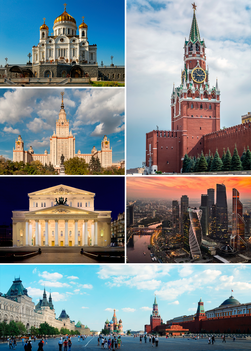 Коллаж для статьи о Москве из фотографий